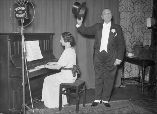 De bekende Brabantse humorist August de Laat, met zijn dochter als begeleiding op piano, wordt in Haarlem door Polygoon gefilmd ter gelegenheid van zijn 25-jarig jubileum 29 januari 1936.